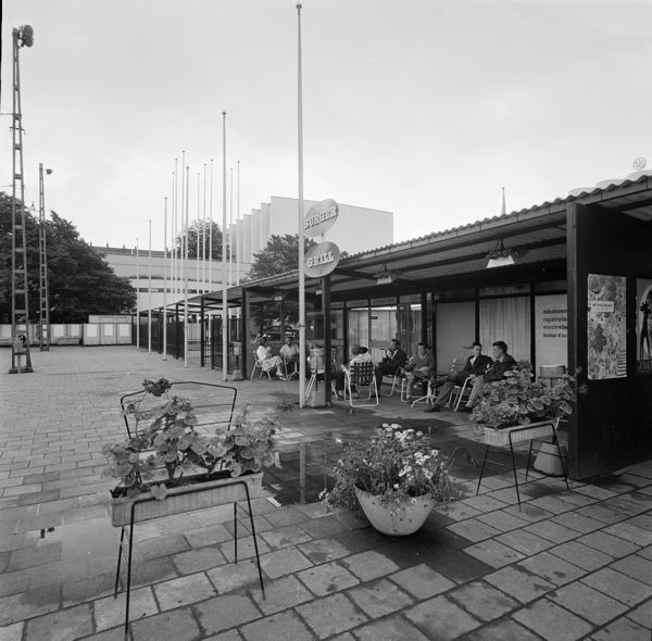 Burger-Grill i Helsingborg i augusti 1958.